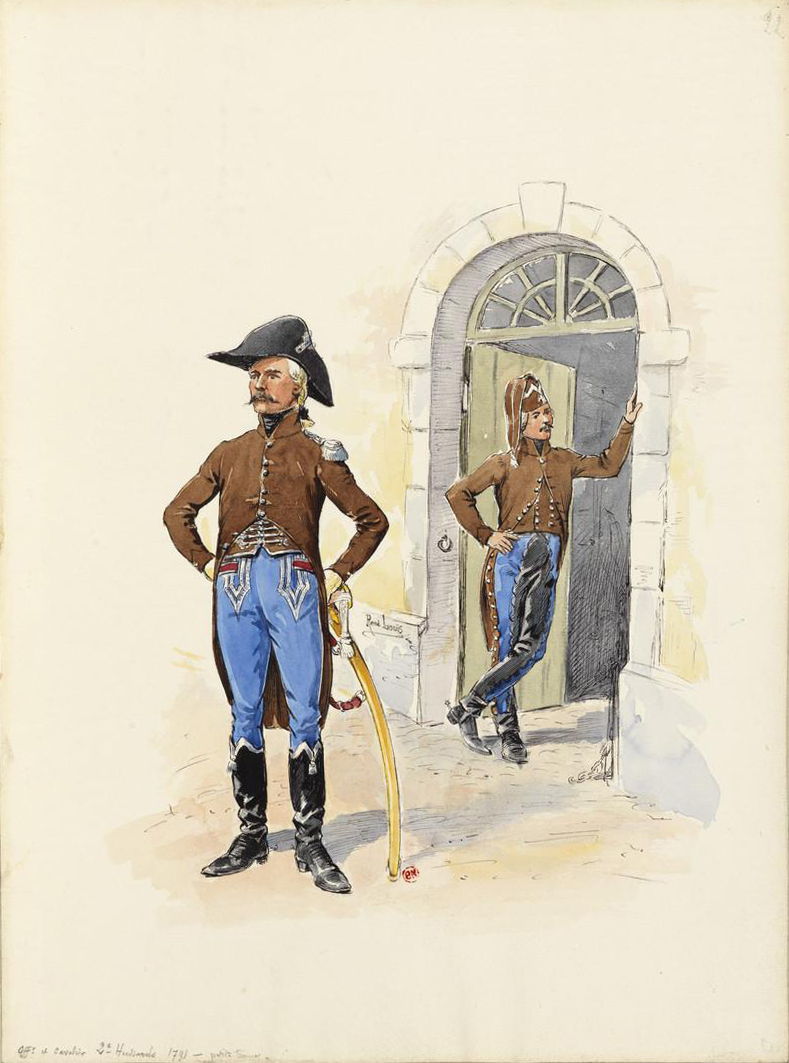 Officier et cavalier du 2e Hussards en petite tenue en 1791.